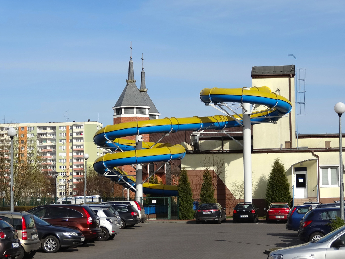 Osiedle Wyżyny w Bydgoszczy, basen Perła